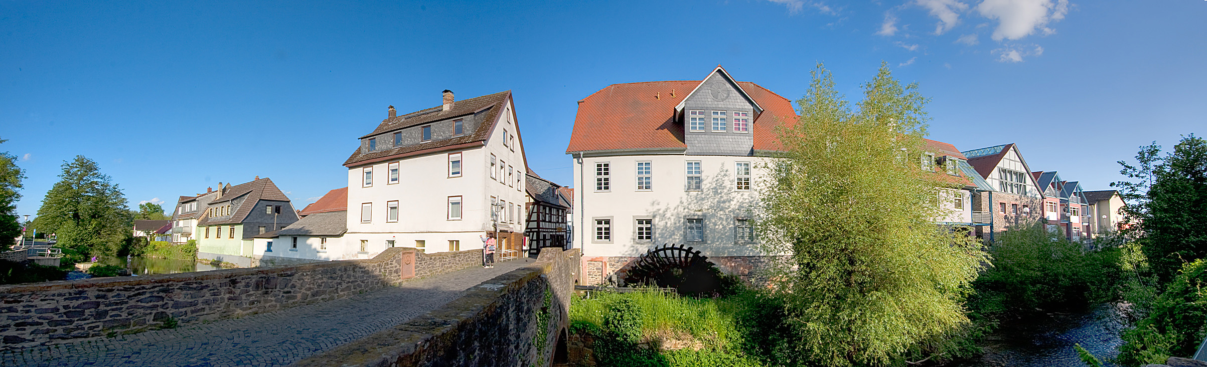 Blick auf die Niddaer Altstadt mit Mühle und Mühlrad. Wetteraukreis, Hessen